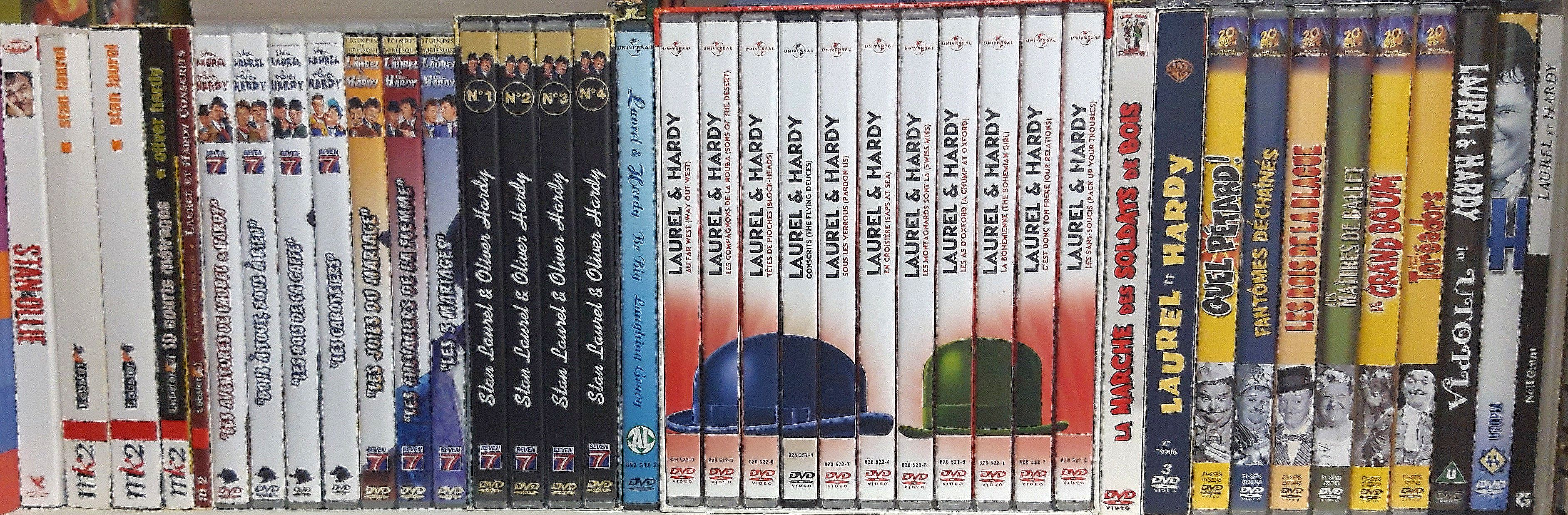 Integrale.